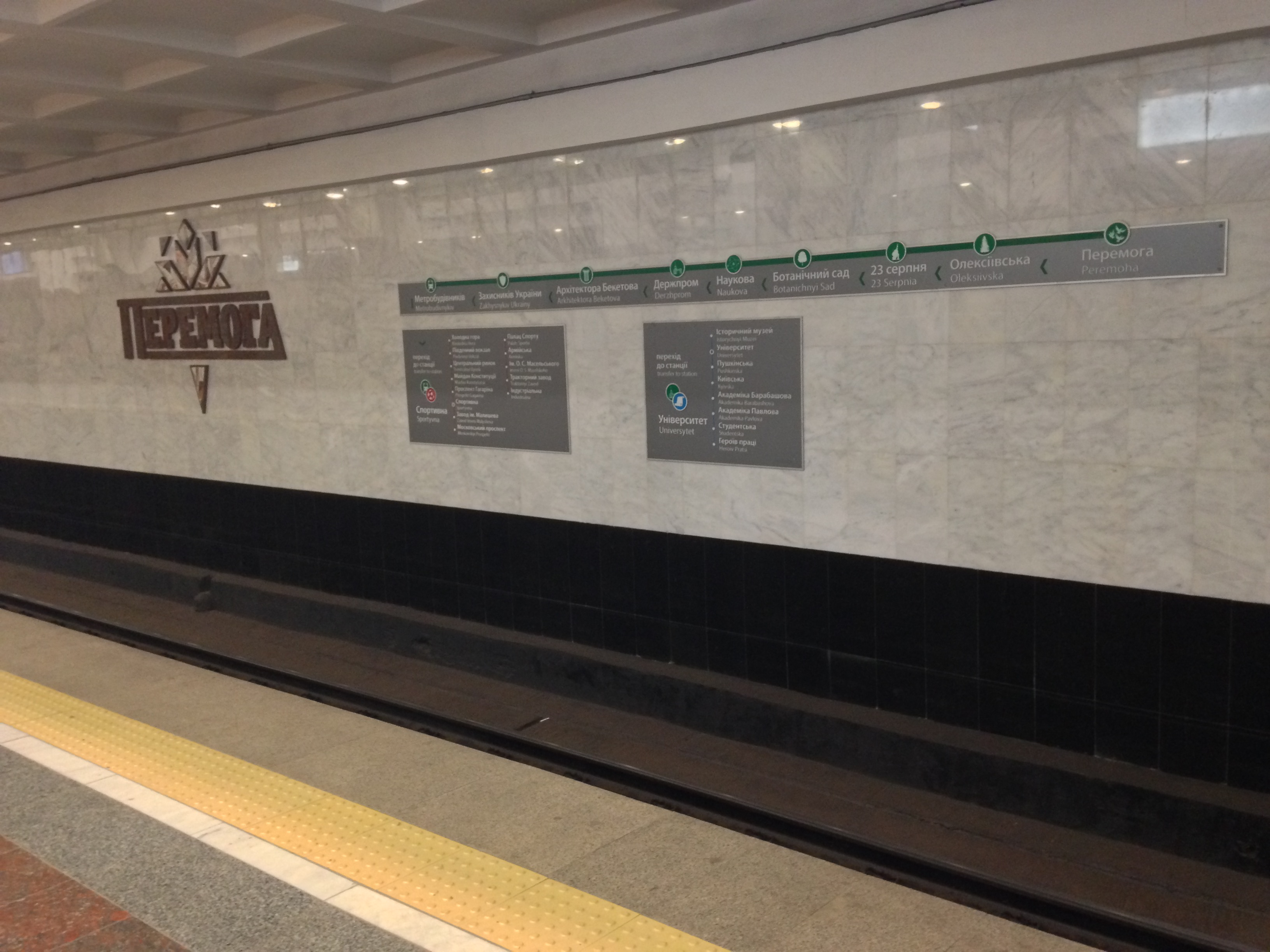 kharkiv metro logo